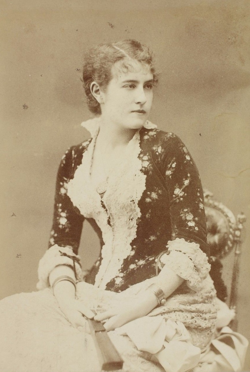 Jeanne Brindeau, tirage albuminé d'époque (vers 1890). Chalot, Paris (11 x 16 cm).